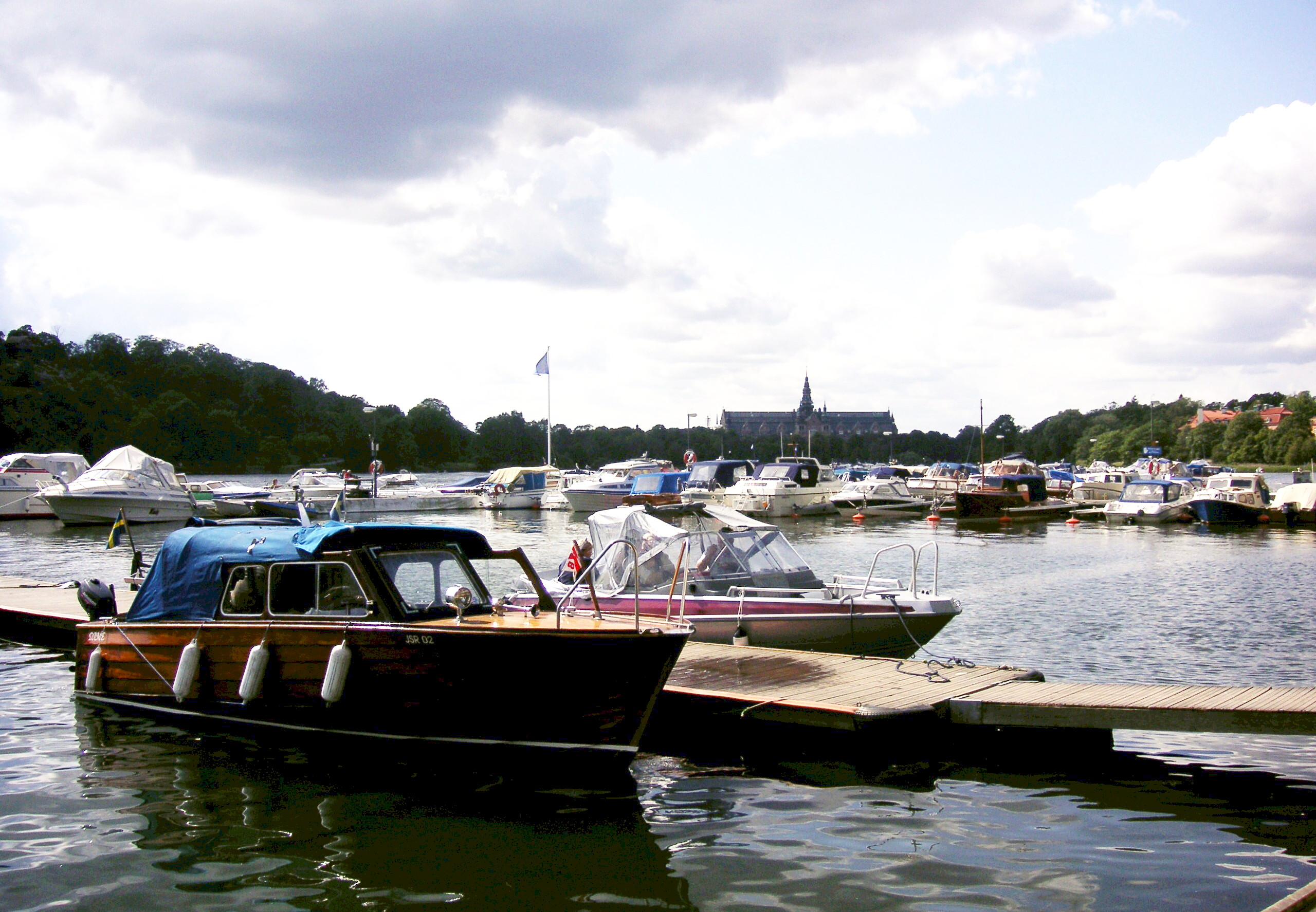 Djurgårdsbrunnsviken sommaren 2007